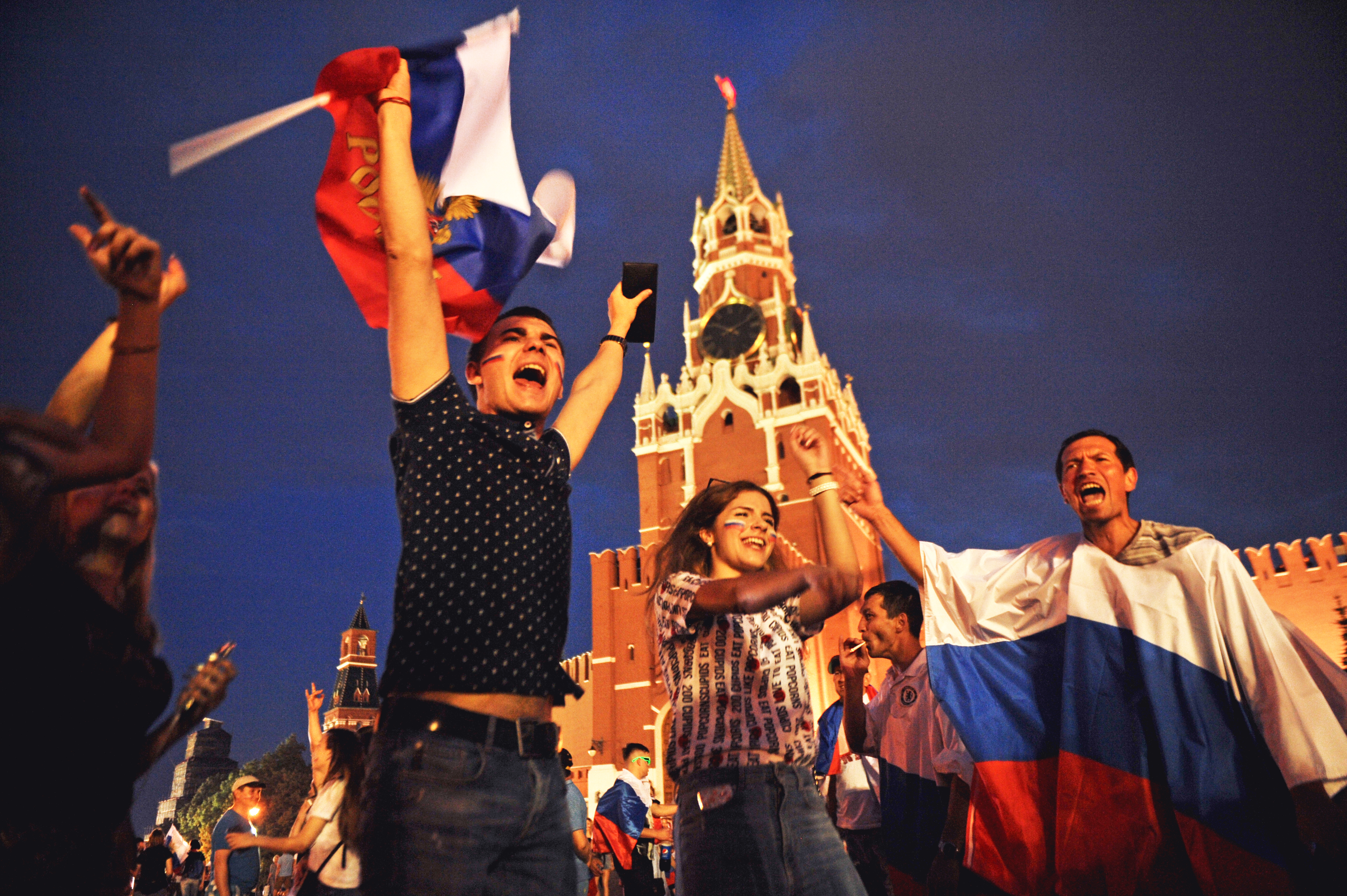 На Красной площади после победы сборной, Центральный округ, Москва